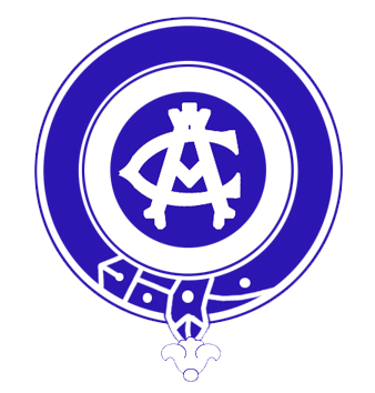 Escudo del Athletic Club (de Bilbao) y de su equipo filial, el Athletic Club de Madrid -actual Atlético de Madrid- en 1903.